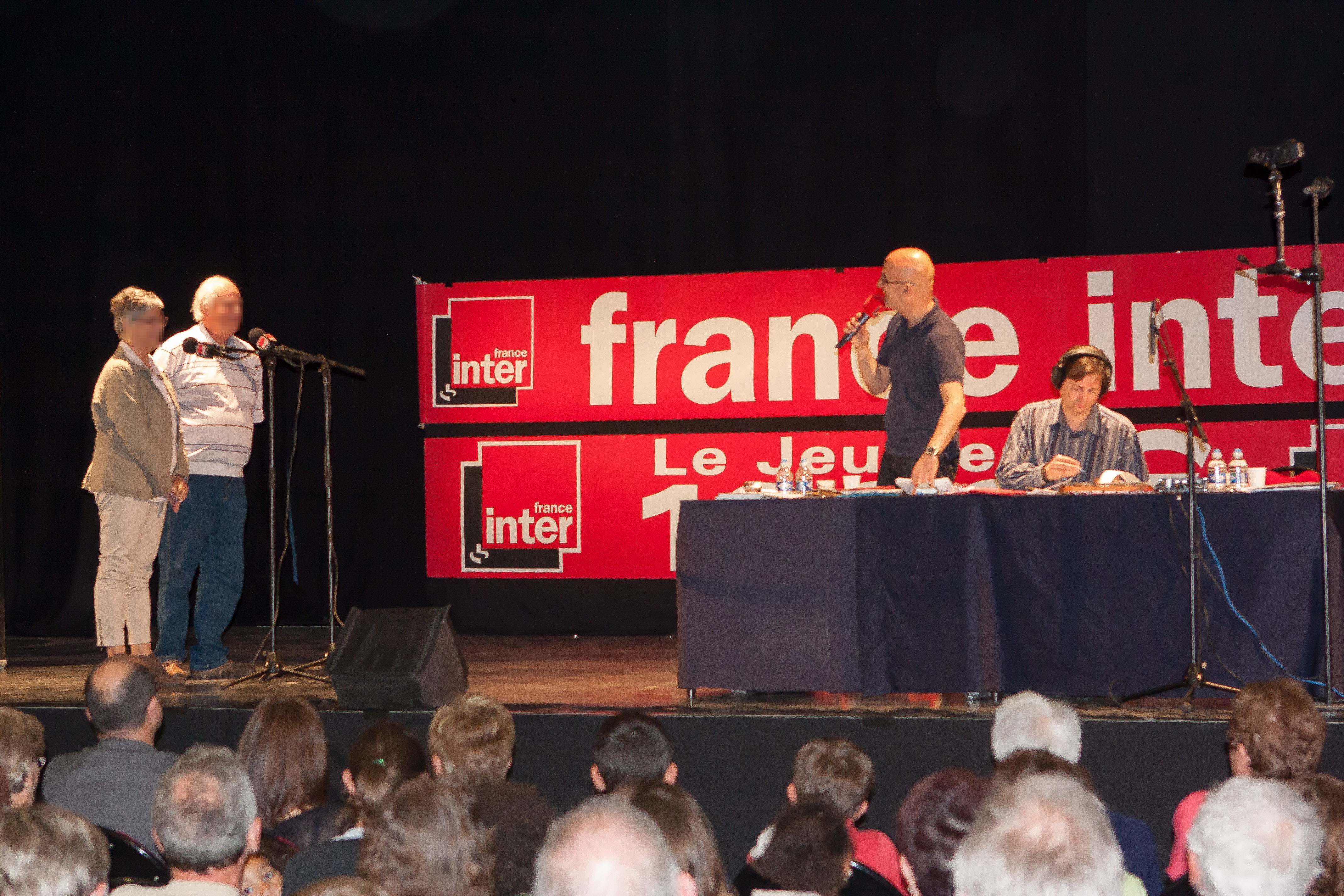 Enregistrement de l'émission de radio "Le Jeu des 1000 euros" dans la salle culturelle La Villa de Villabé le 23 avril 2015 / Villabé, Essonne, France